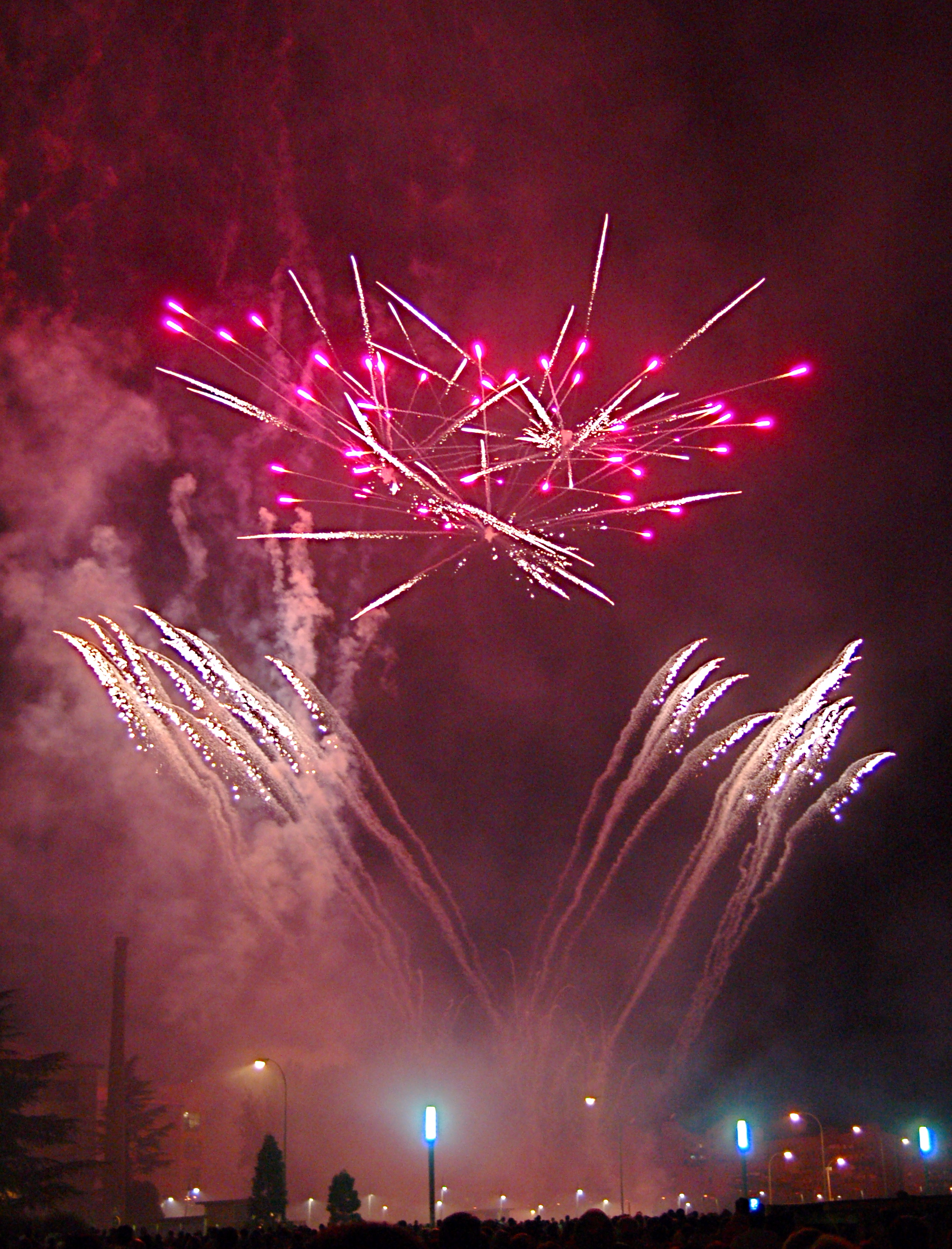 Fuegos artificiales en las fiestas de San Juan y San Pedro de León.